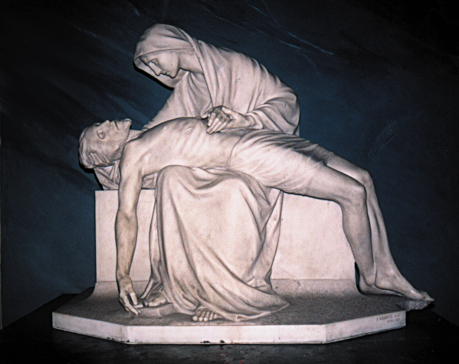 Ruda Śląska, ul. Piastowska 16 - kościół parafialny pw. św. Józefa (zabytek nr A/8/99)